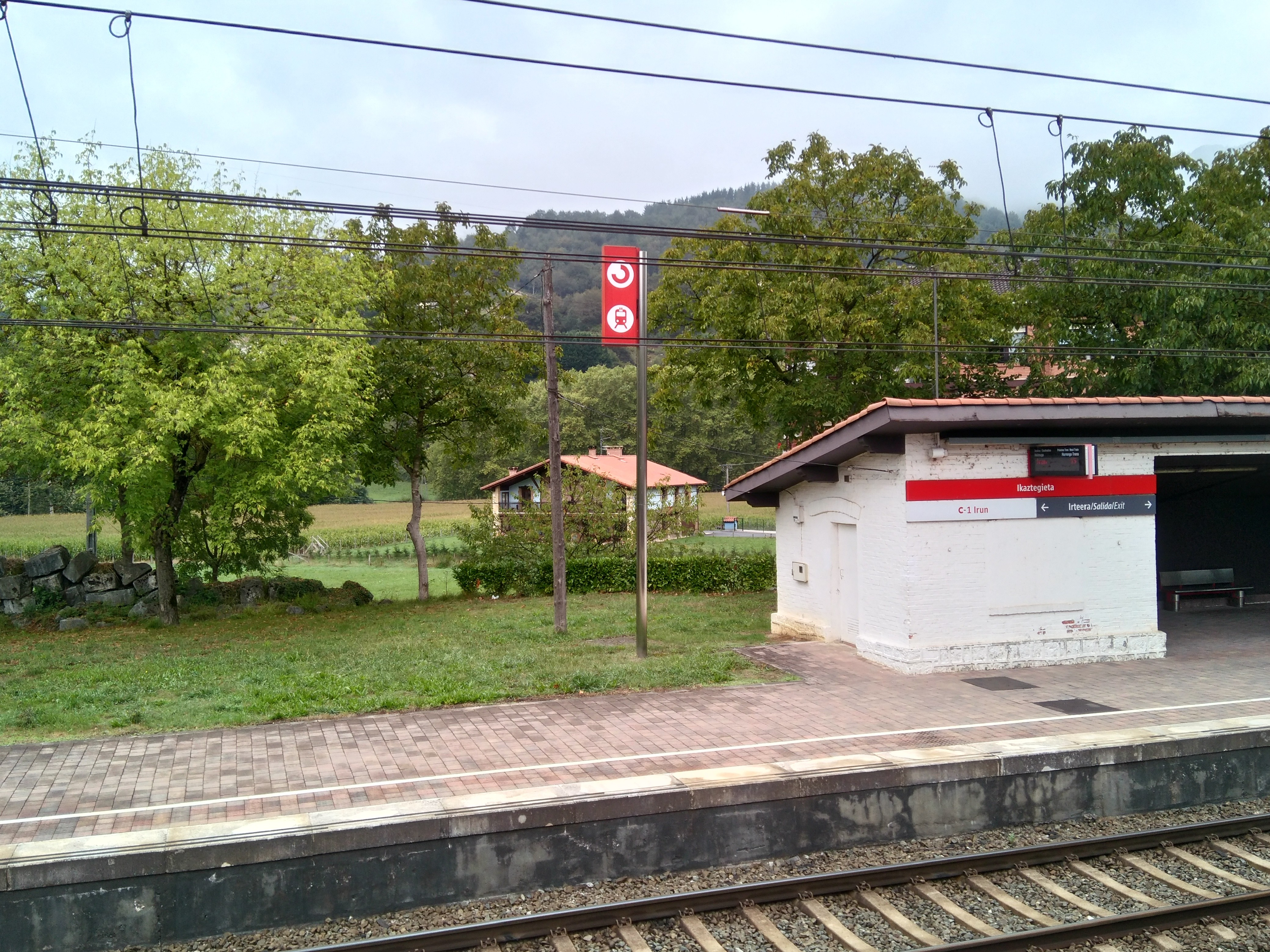 Icazteguieta